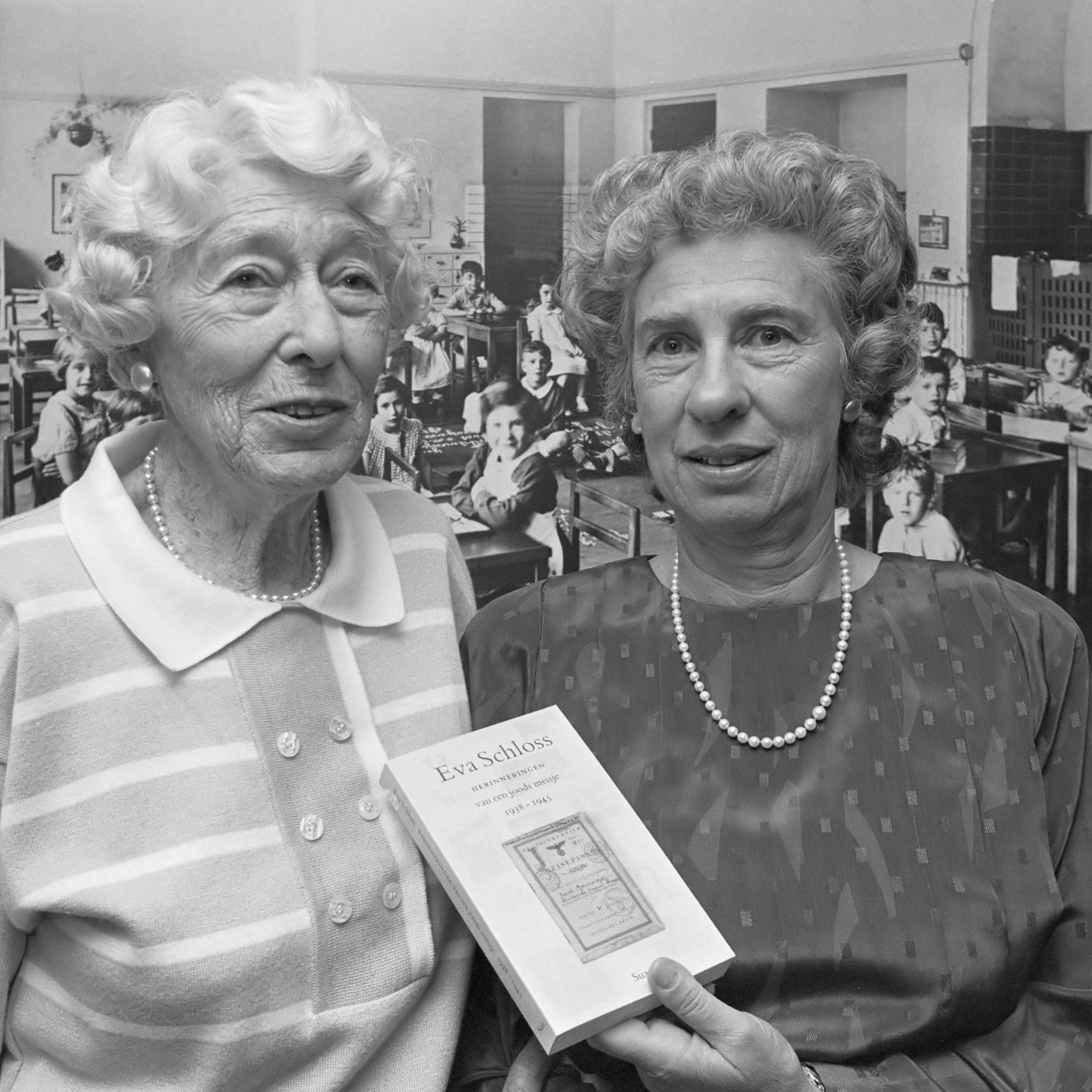 Eva Schloss presenteert het boekje "Herinneringen van een joods meisje", links haar moeder Fritzi Frank 24 april 1989